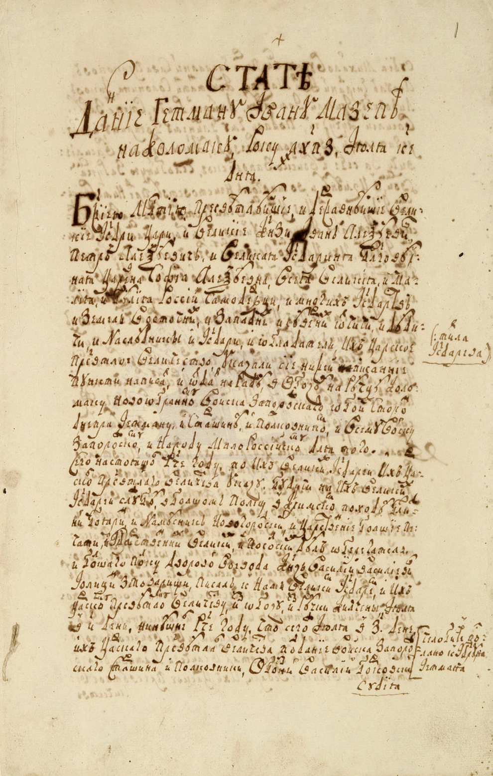 Коломацькі статті - договір, укладений між новообраним гетьманом Війська Запорозького Іваном Мазепою із старшиною та представниками московського уряду. 25 липня 1687. ЦДІАК України, ф. 220, оп. 1, спр. 210. арк. 1, 6, 6 зв.